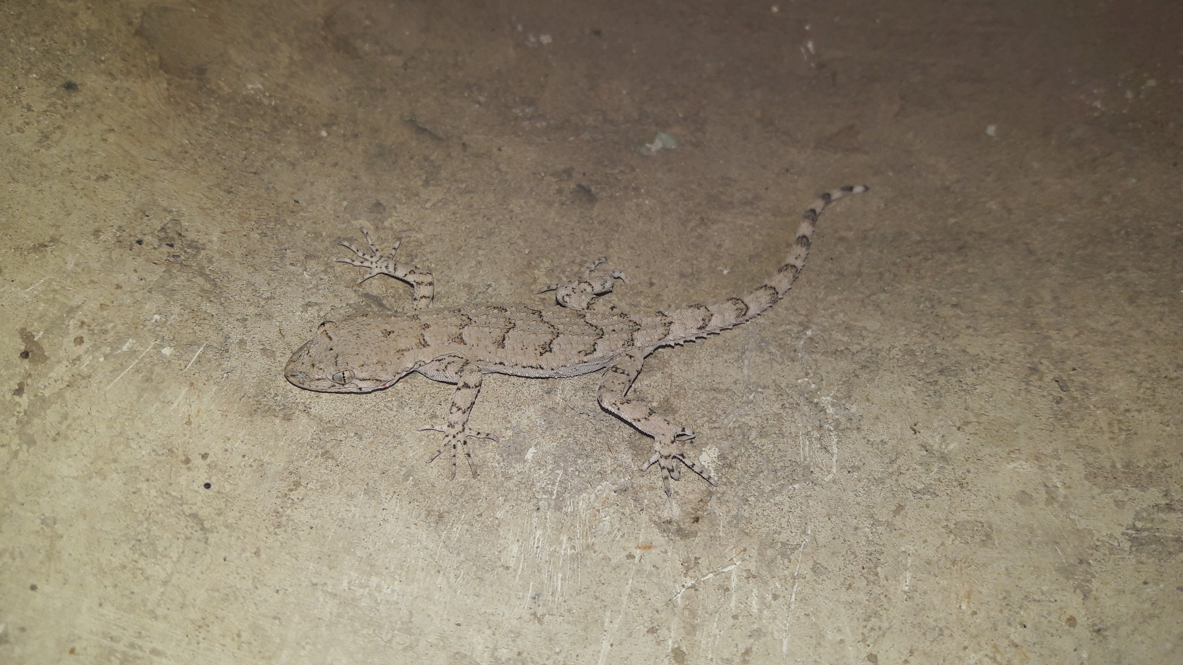 Қазақша (кирил): Серый геккон